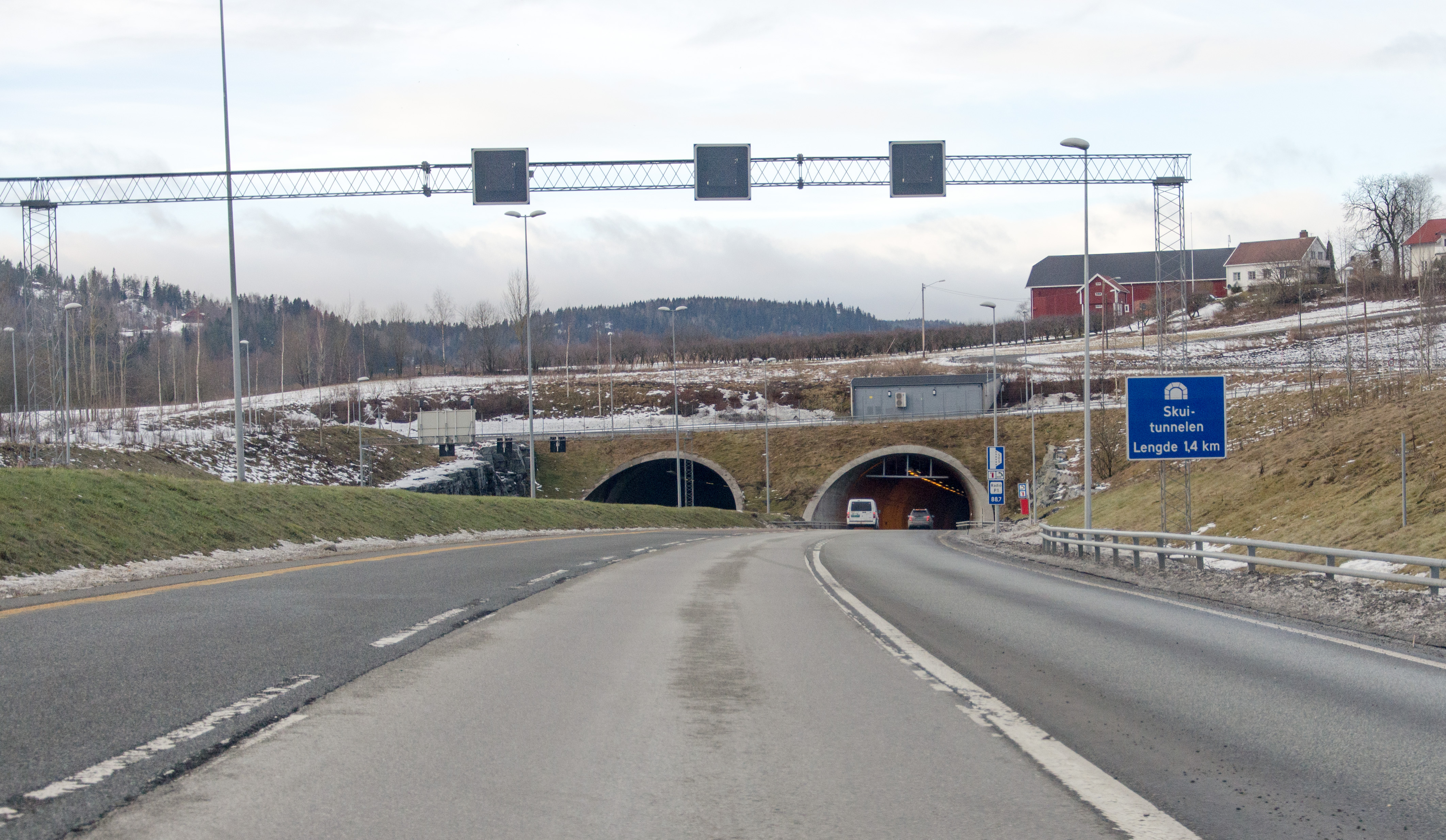 Skuitunnelen